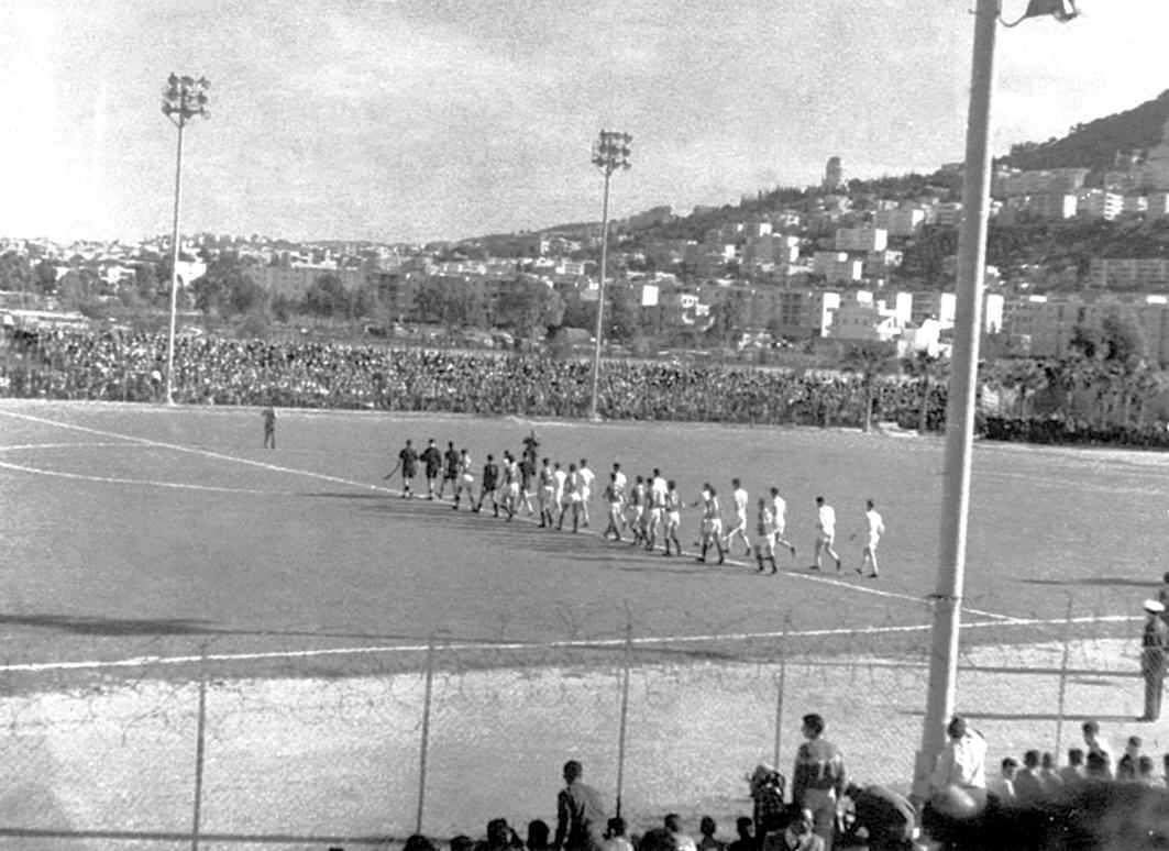 אצטדיון קרית אליעזר בשנות החמישים